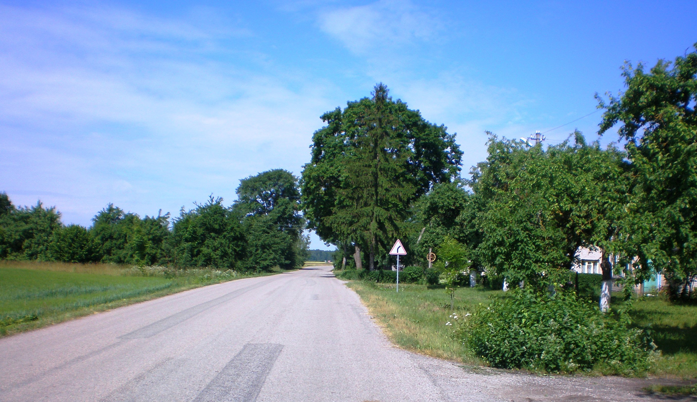 Pakruostė, Kėdainių raj.